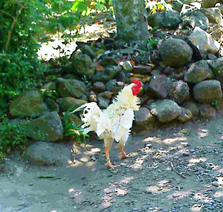 Ayam walik putih. Ayam walik, ayam yang bulunya tumbuh ke arah terbalik sehingga tampak seperti kribo.